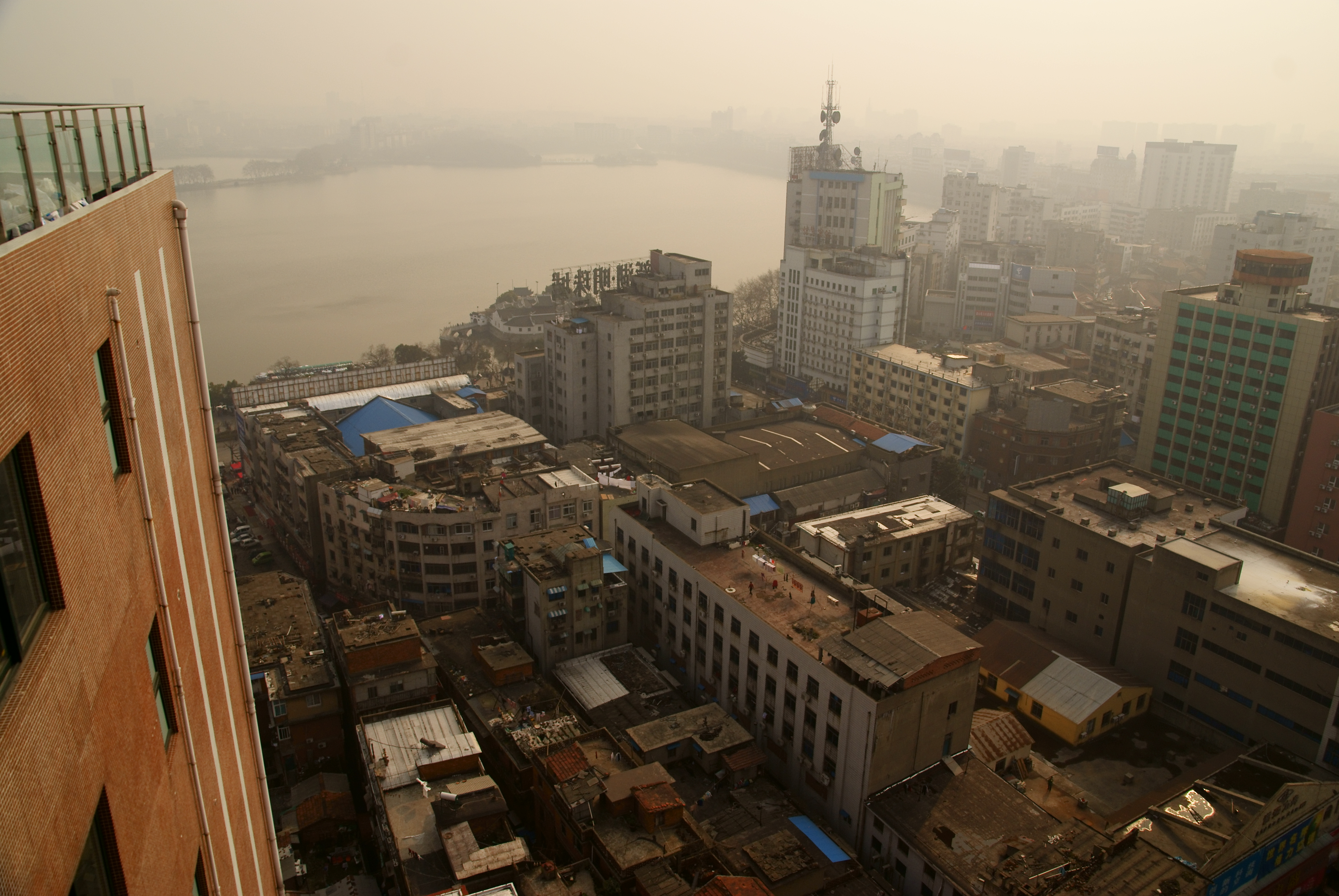 Jiujiang